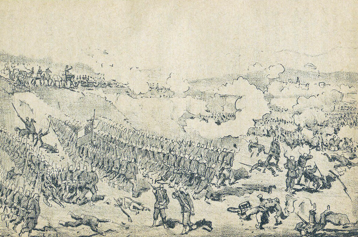 Dibujo de la Batalla de Tacna, durante la guerra del pacifico.